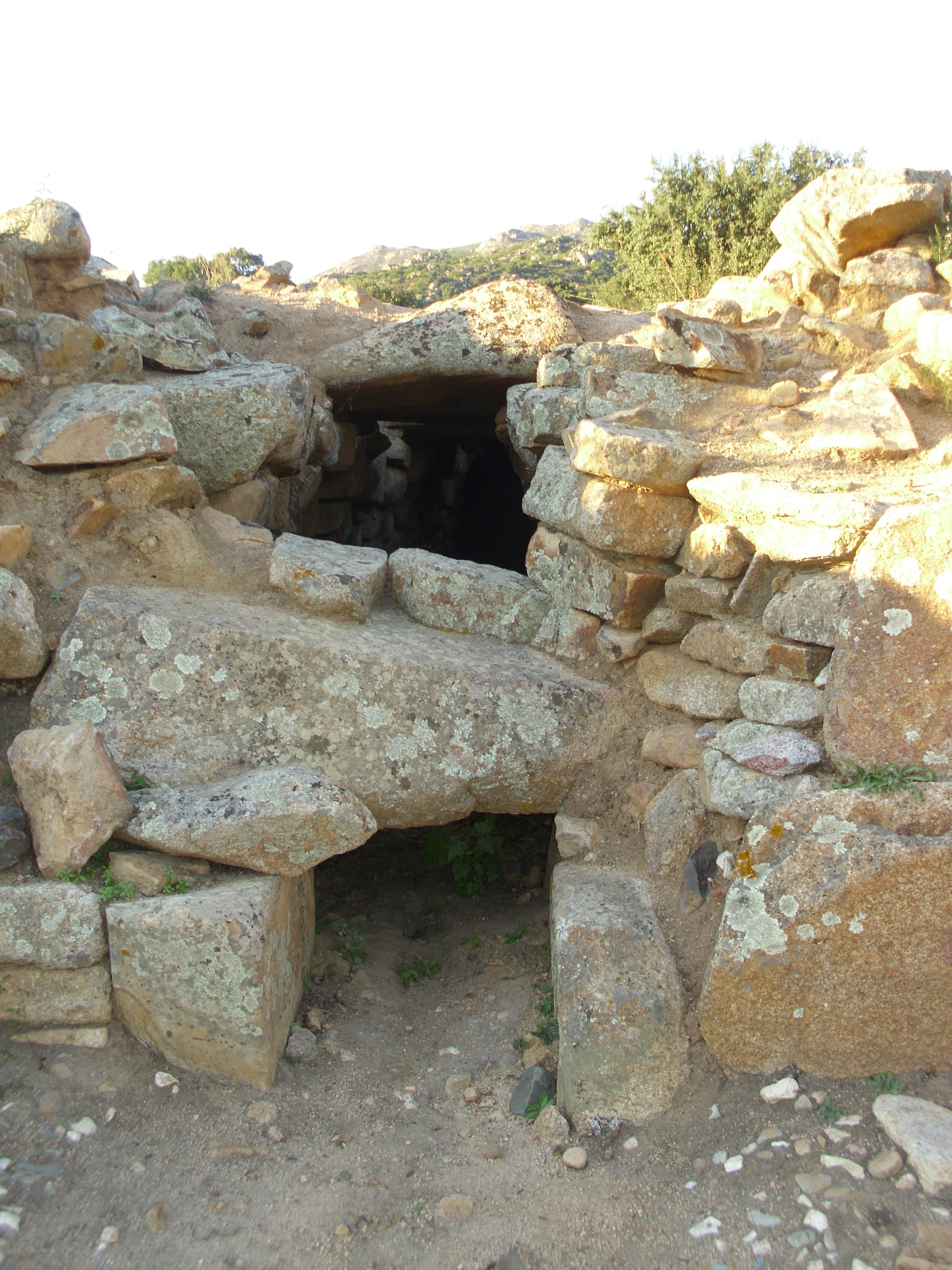 La tomba dei giganti fa parte della tipologia di sepolcri monumentali e collettivi caratteristici dell’età nuragica. Quella di San Cosimo che si trova a Gonnosfanadiga è conosciuta anche con il nome di Sa Grutta de Santu Giuanni. È costruita con blocchi di granito di diverse dimensioni e ha l’ingresso rivolto verso sud.